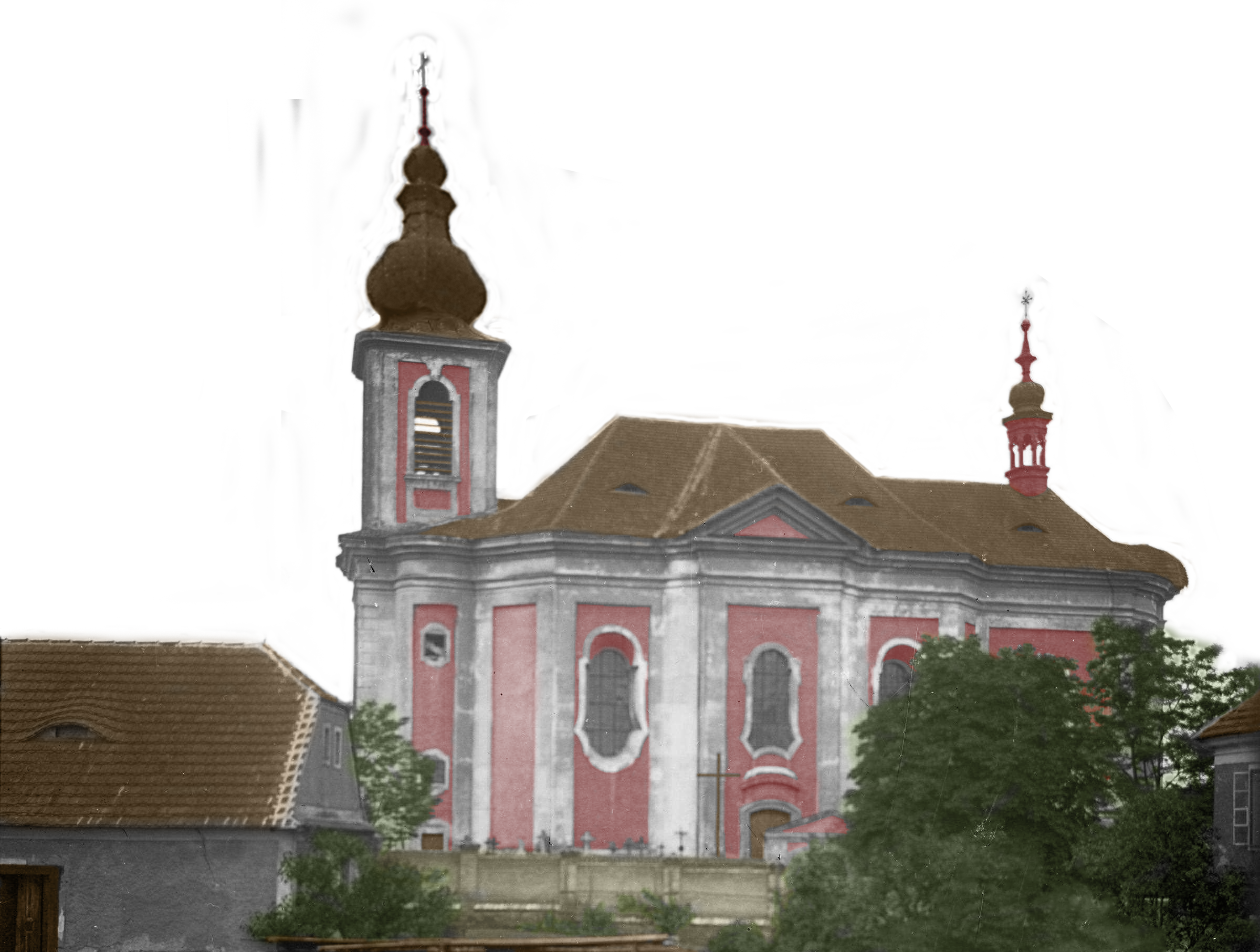 Pravděpodobná původní podoba kostela sv. Martina